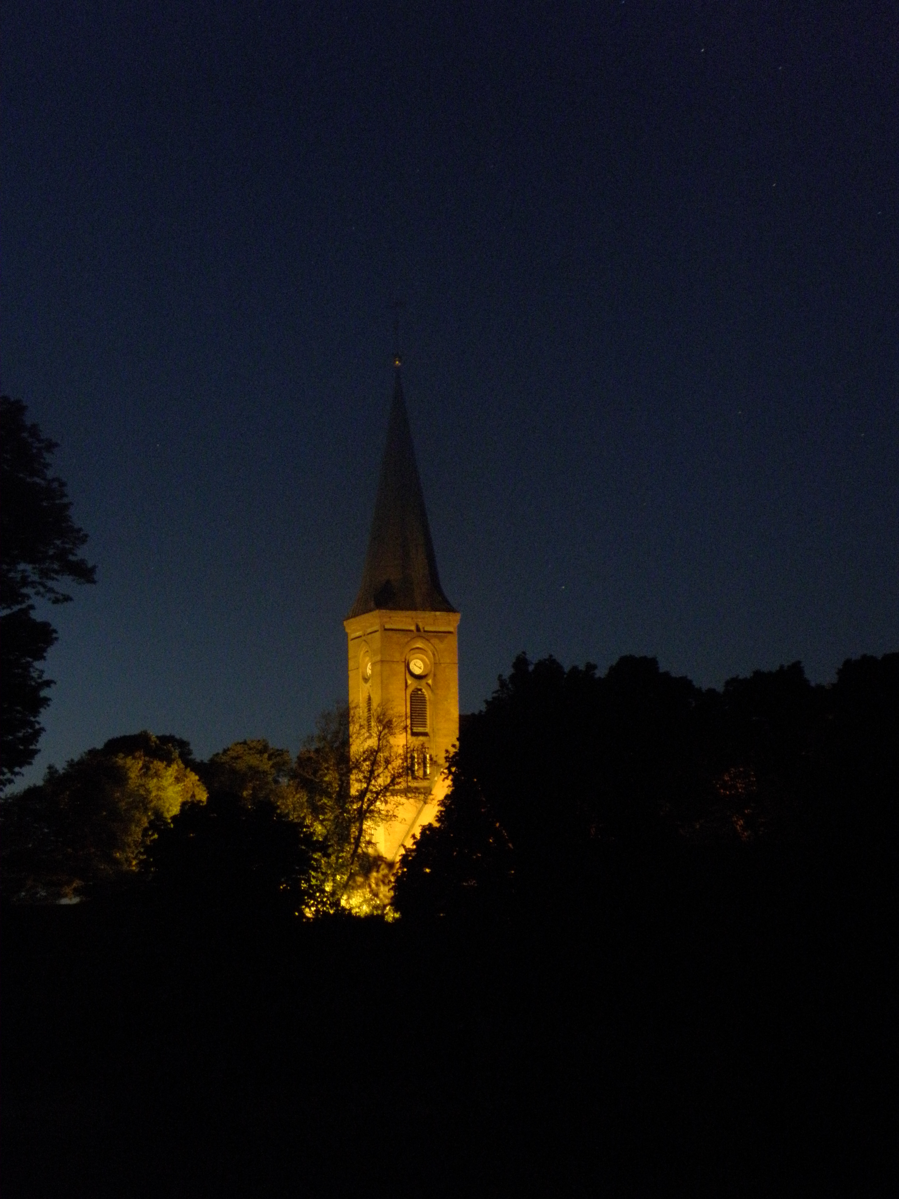 Kirche Hohenreinkendorf angestrahlt bei Nacht